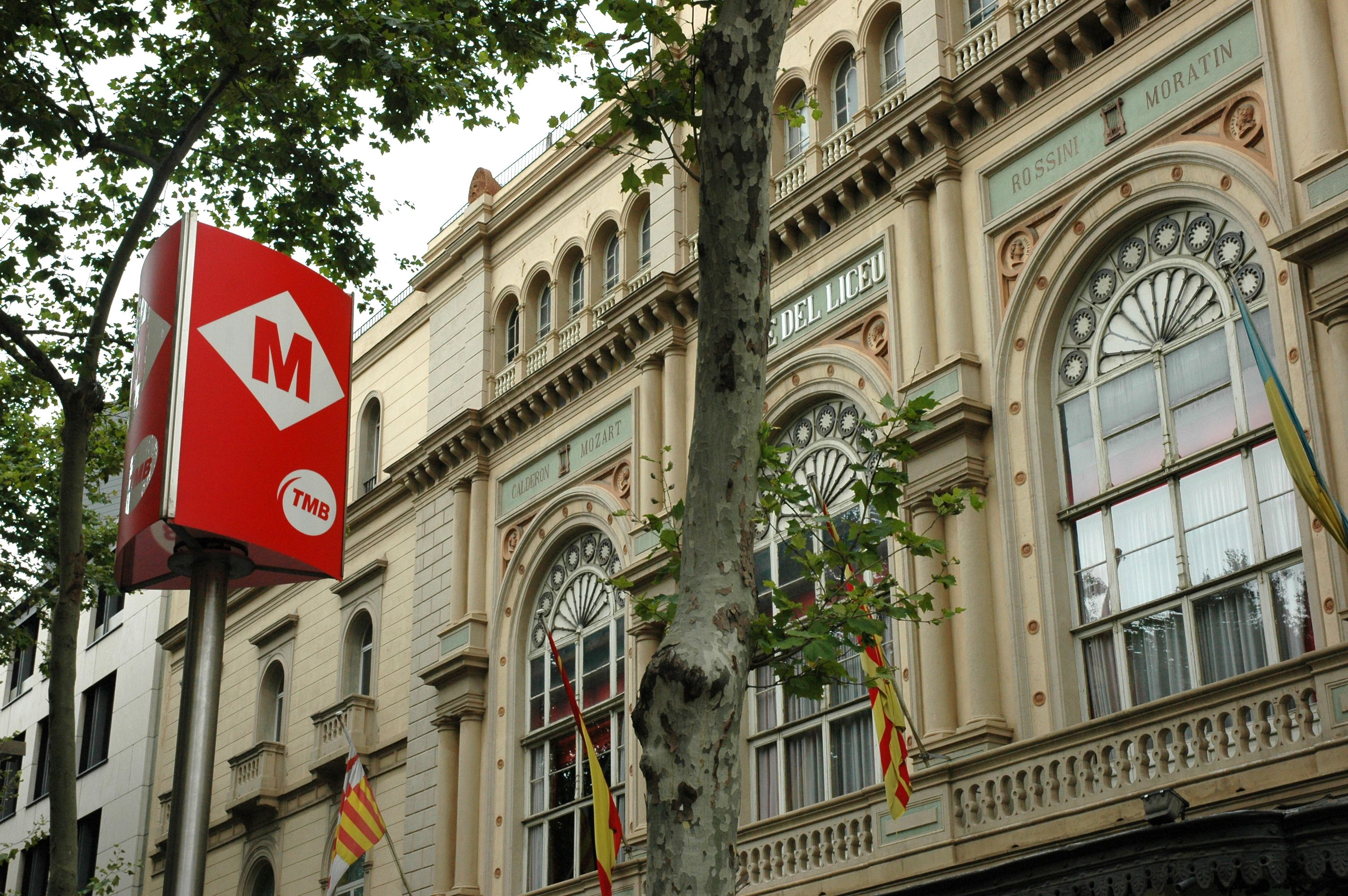 Línia 3 del Metro de Barcelona - Parada Liceu